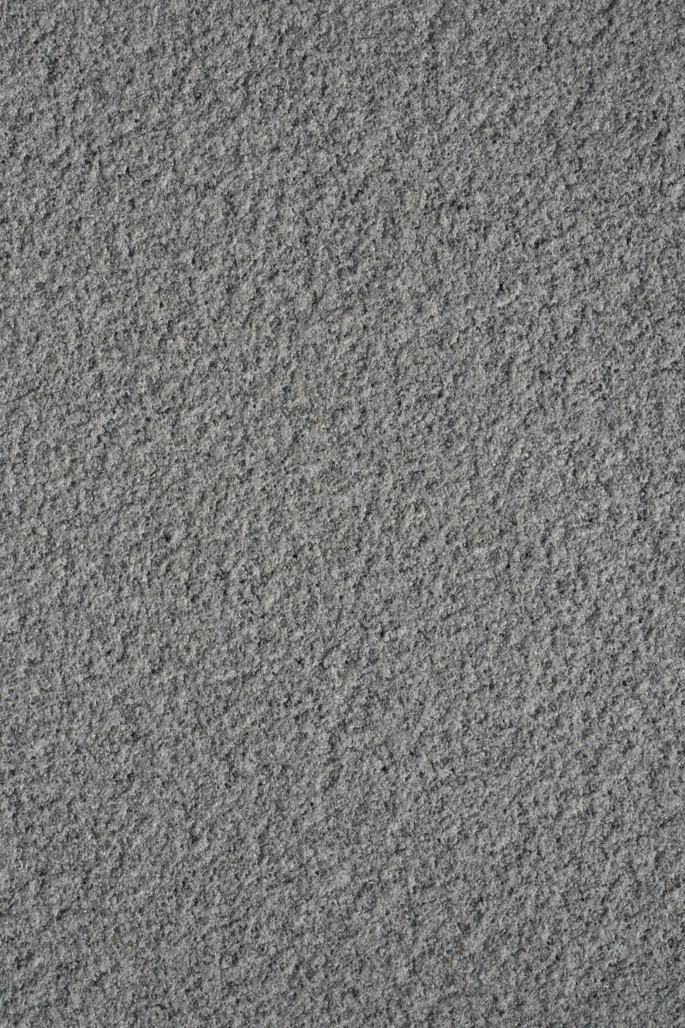 Ruhrsandstein sandgestrahlt (Muster ca. 24 x 15 cm)